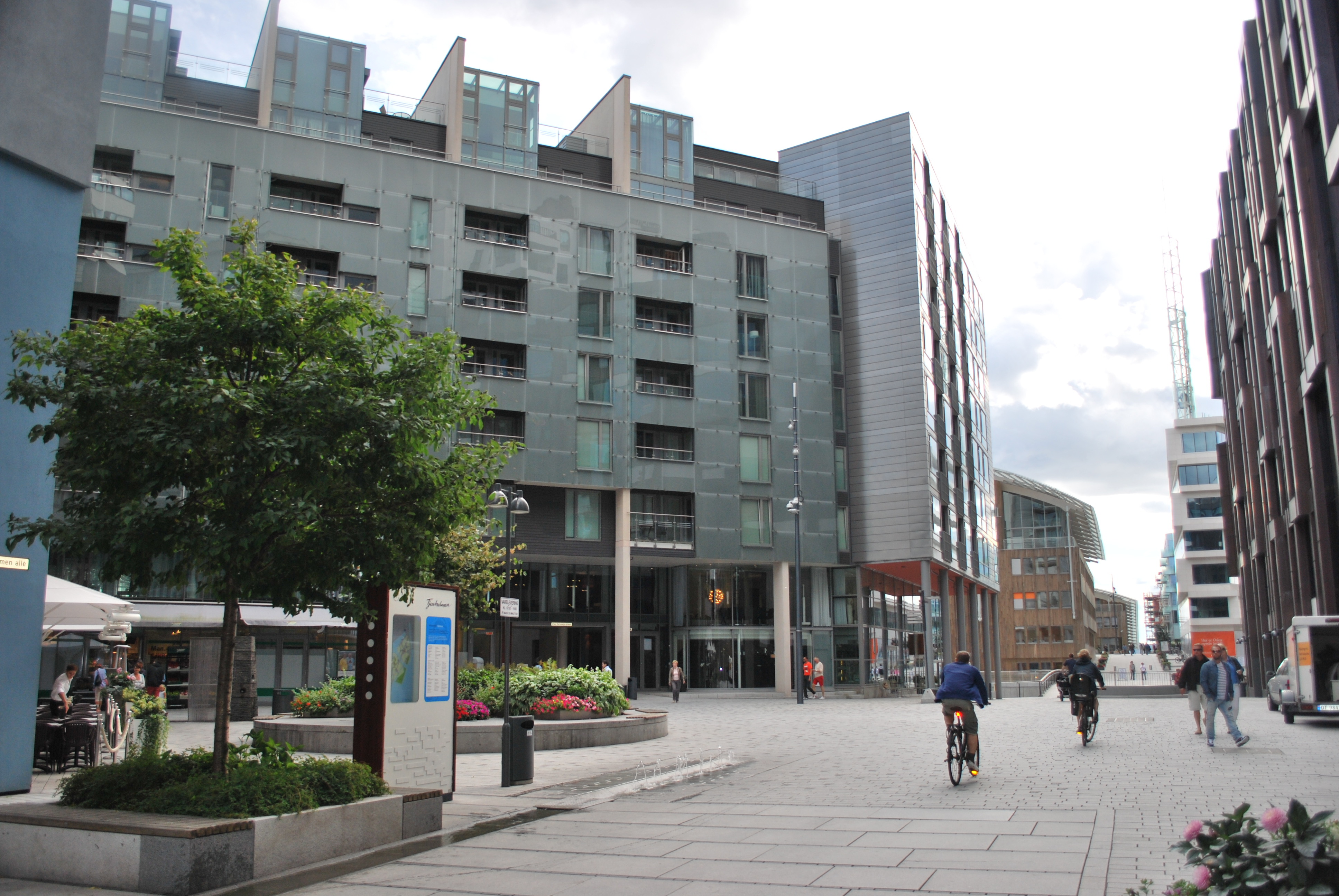 Olav Selvaags plass med Tjuvholmen allé, Tjuvholmen, Oslo